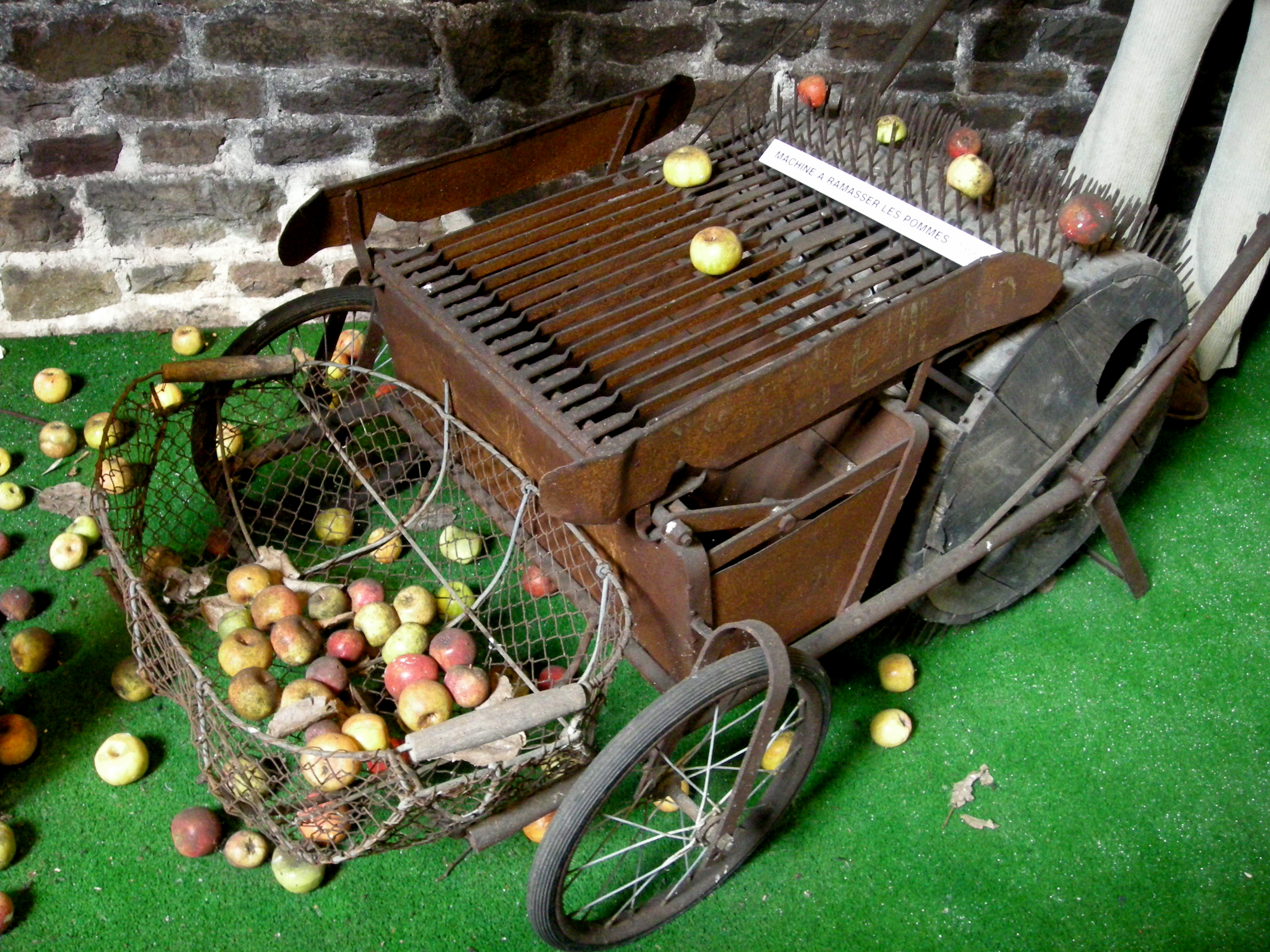 Machine à ramasser les pommes (scène de la vie rurale dans une ferme cidricole à Saint-Jean-des-Champs, département de la Manche, Normandie)